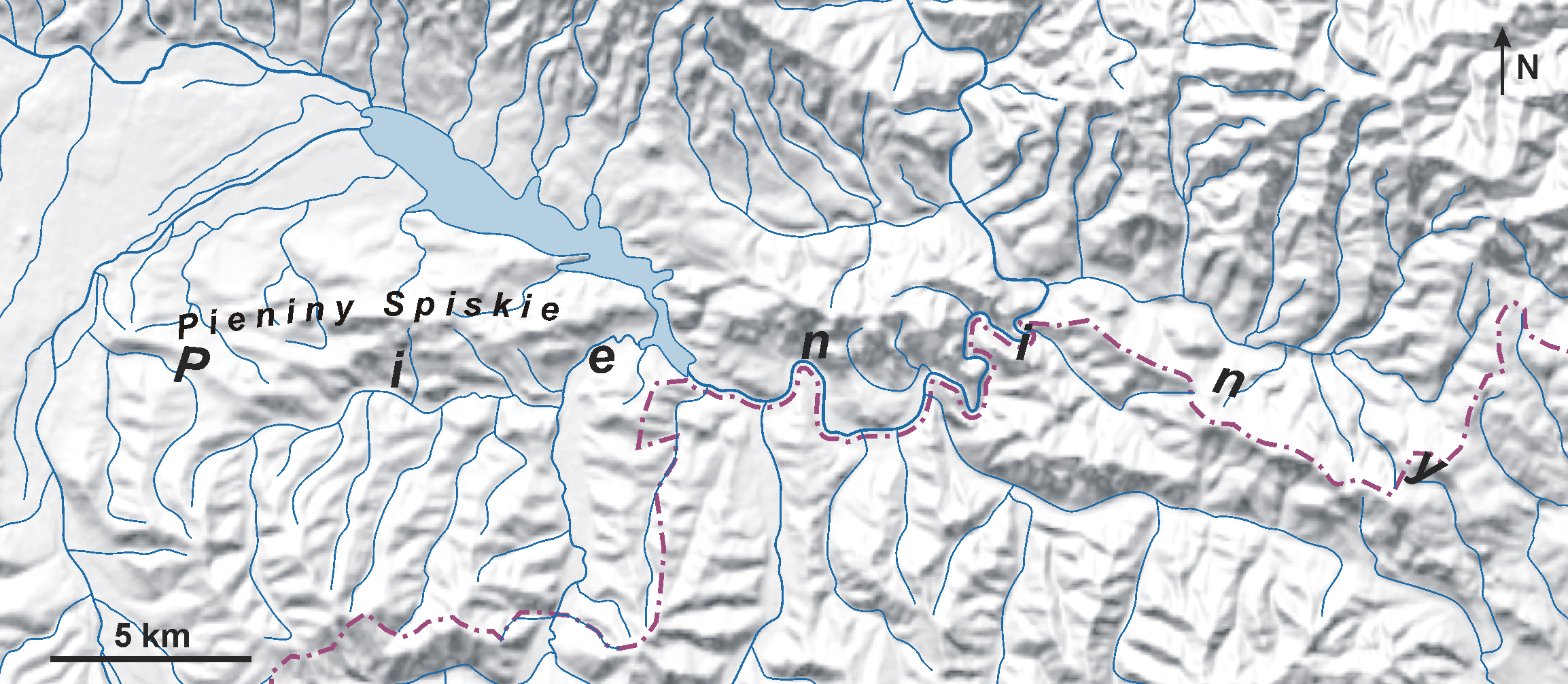 Pieniny (Pieniny Spiskie) – mapa plastyczna rzeźby terenu. Autor: Aotearoa